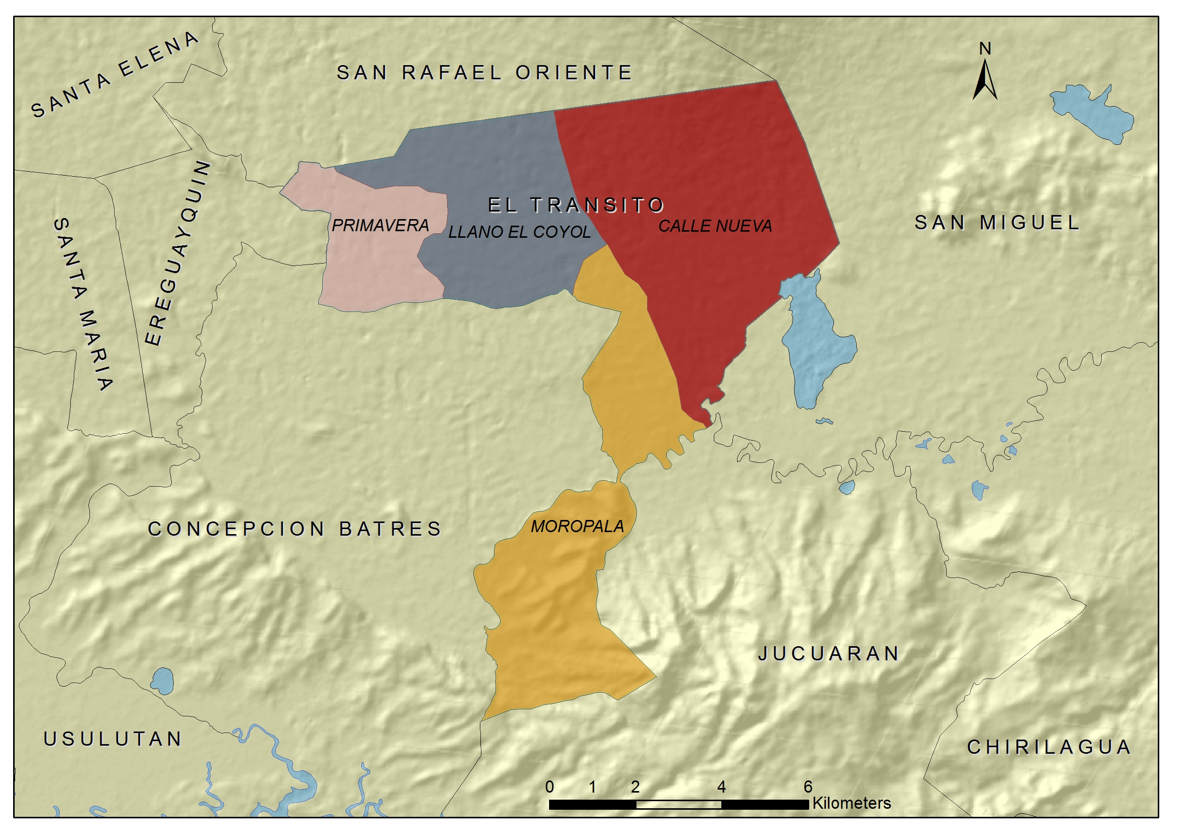 Esta imagen muestra los límites administrativos de El municipio de El Tránsito, así como su división cantonal.